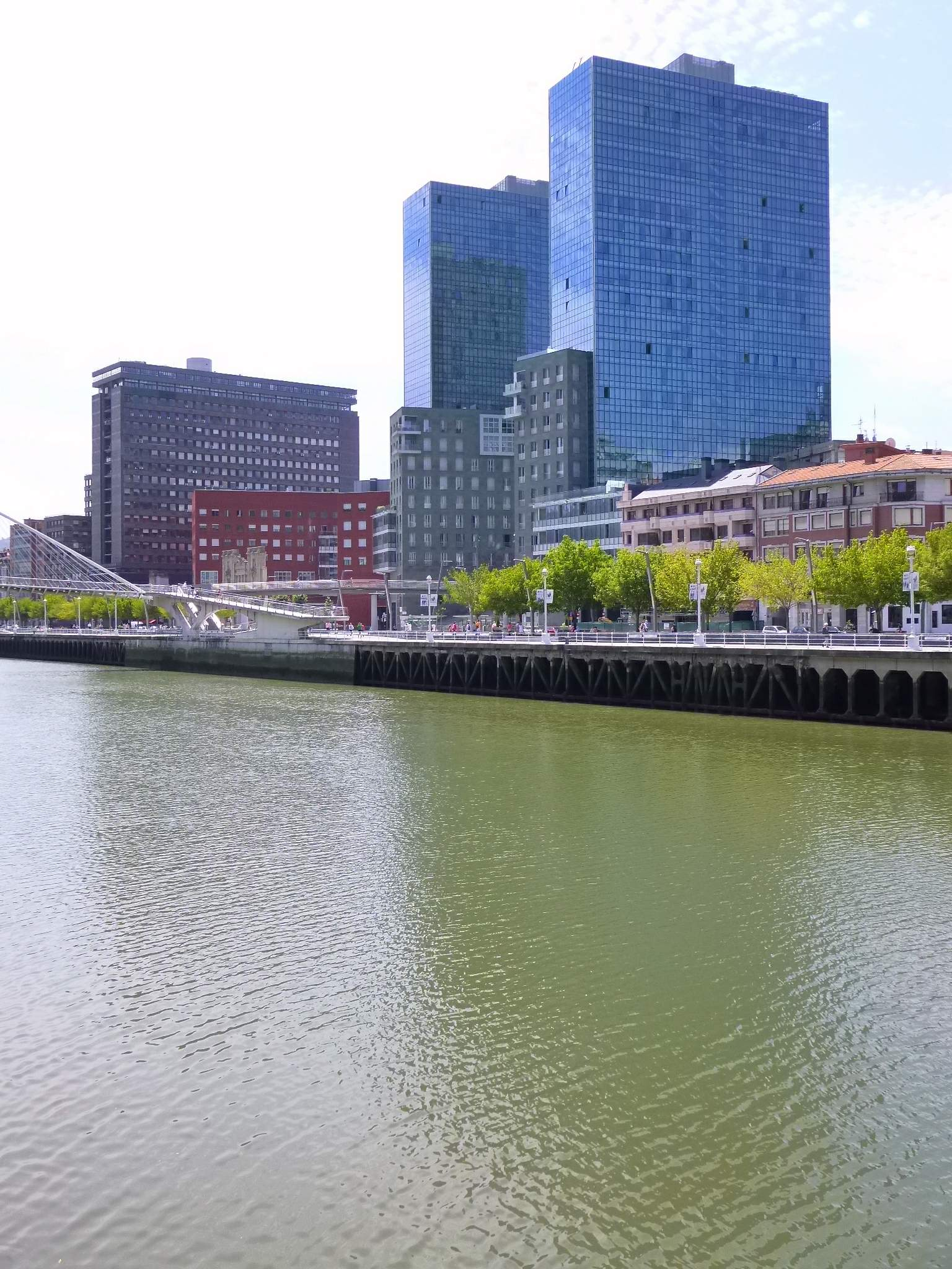 Isozaki Atea (Torres Isozaki), en Bilbao